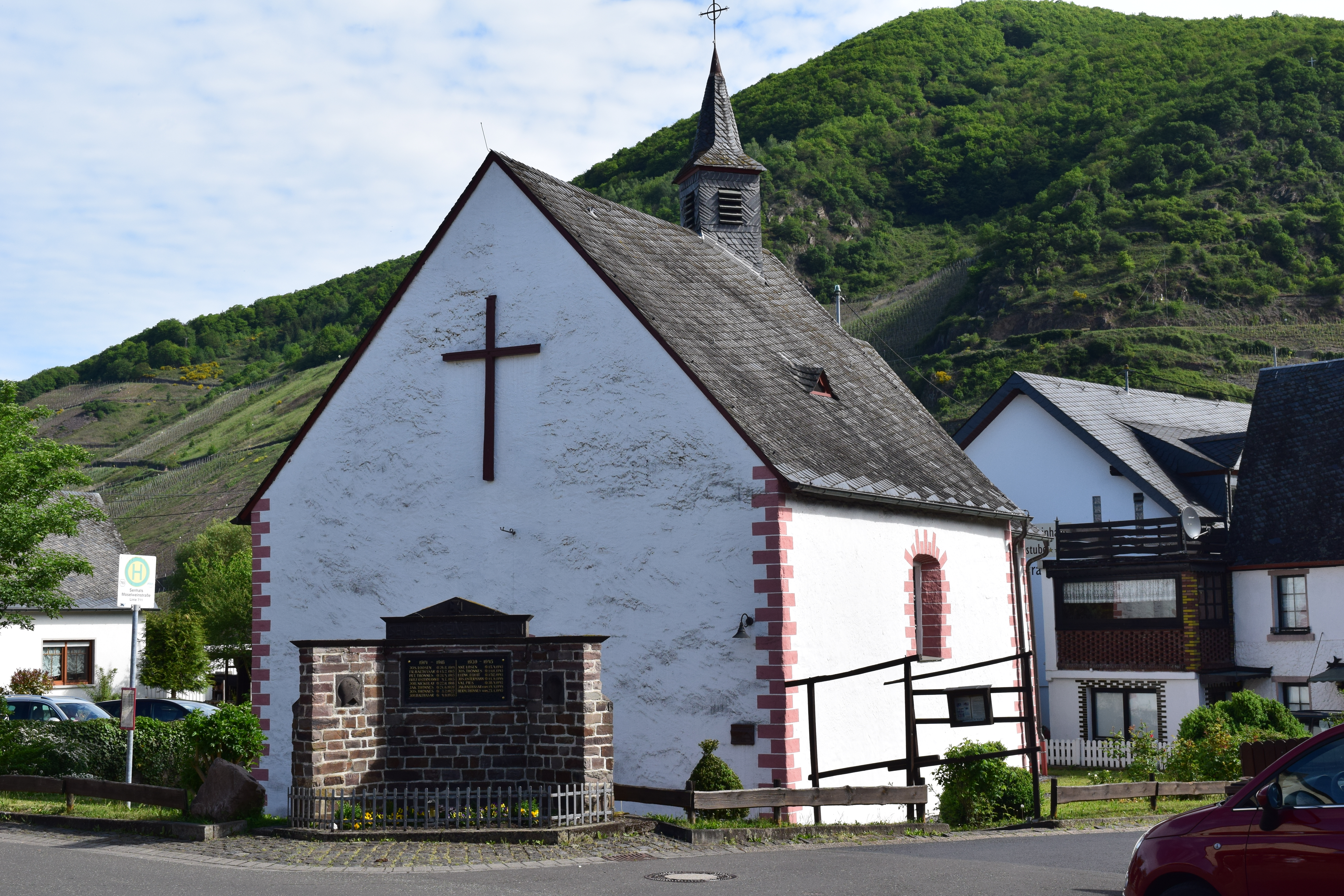 Kerkje in Senhals am Mosel